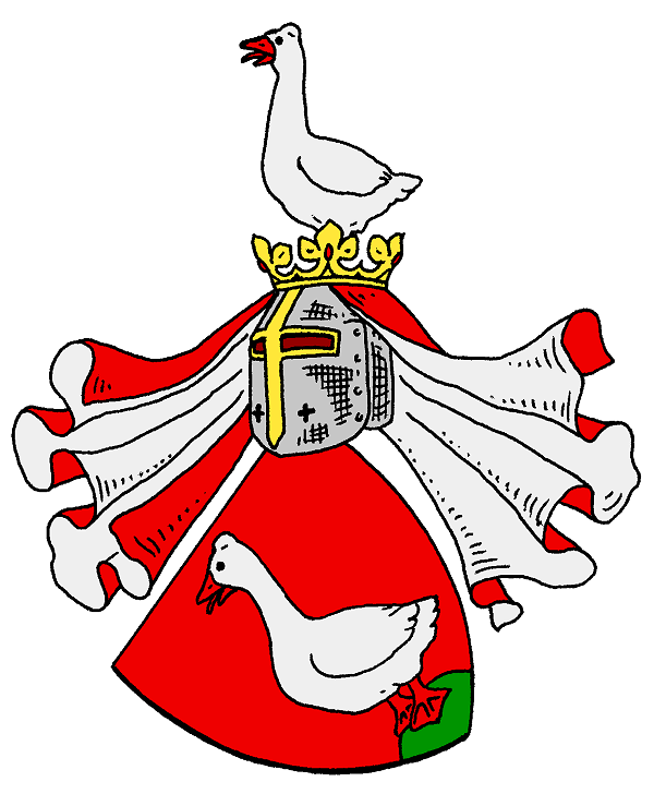 Wappen derer von Deym